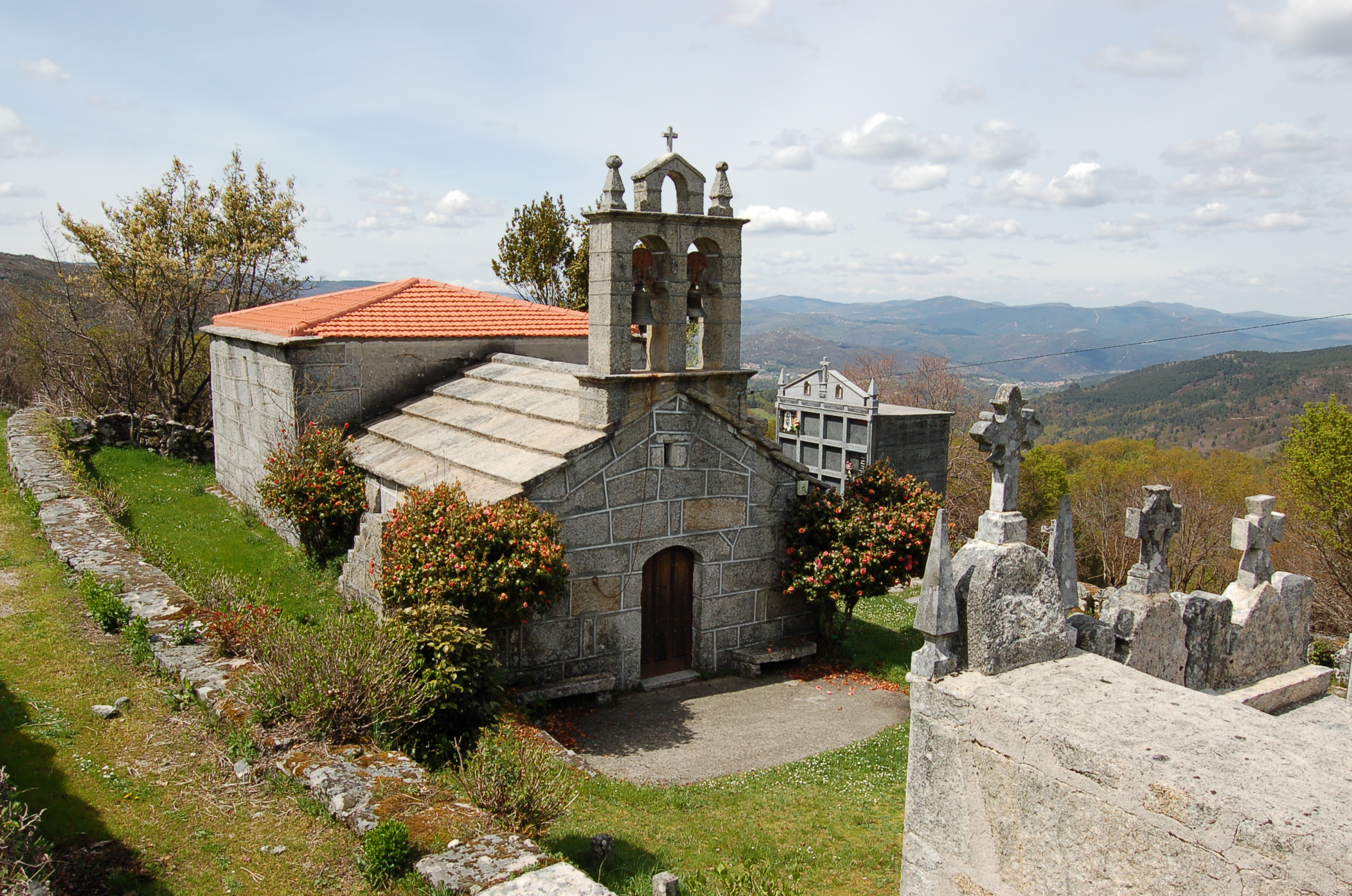 Igrexa parroquial de Santo Antonio de Cortegazas, no concello de Avión